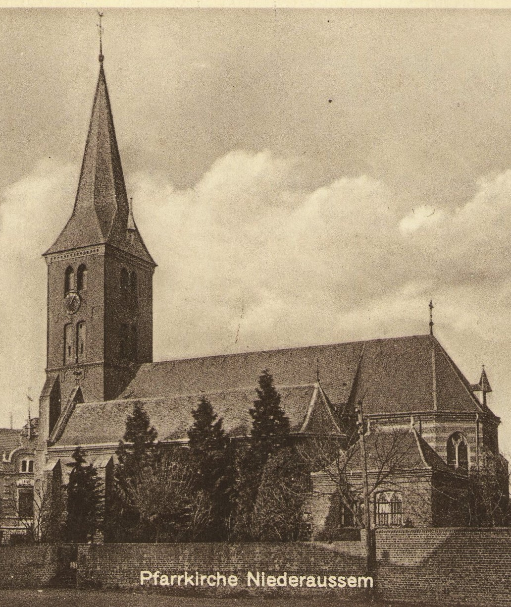 verlängertes Hauptschiff